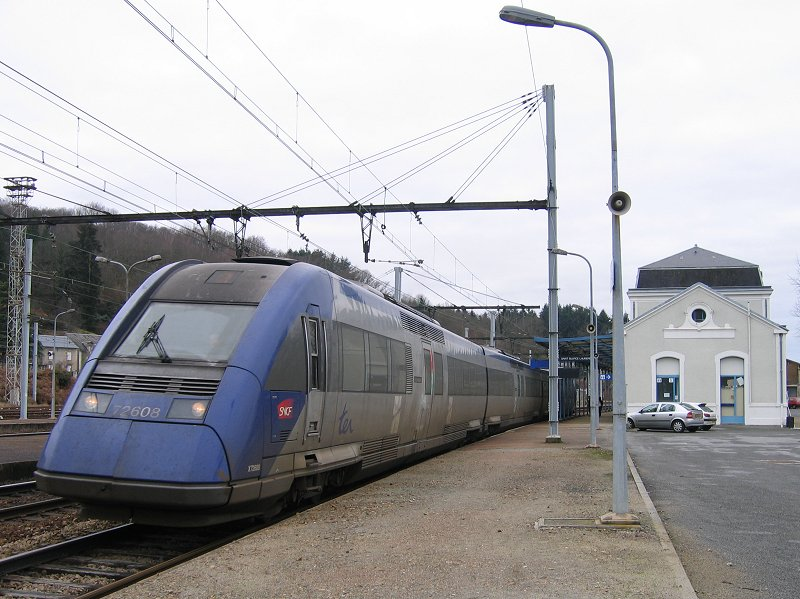 Autorail tri-caisses X 72500 de la Région Rhône-Alpes effectuant la relation "Corail intercité" Bordeaux - Lyon ici en gare de Saint Sulpice Laurière.